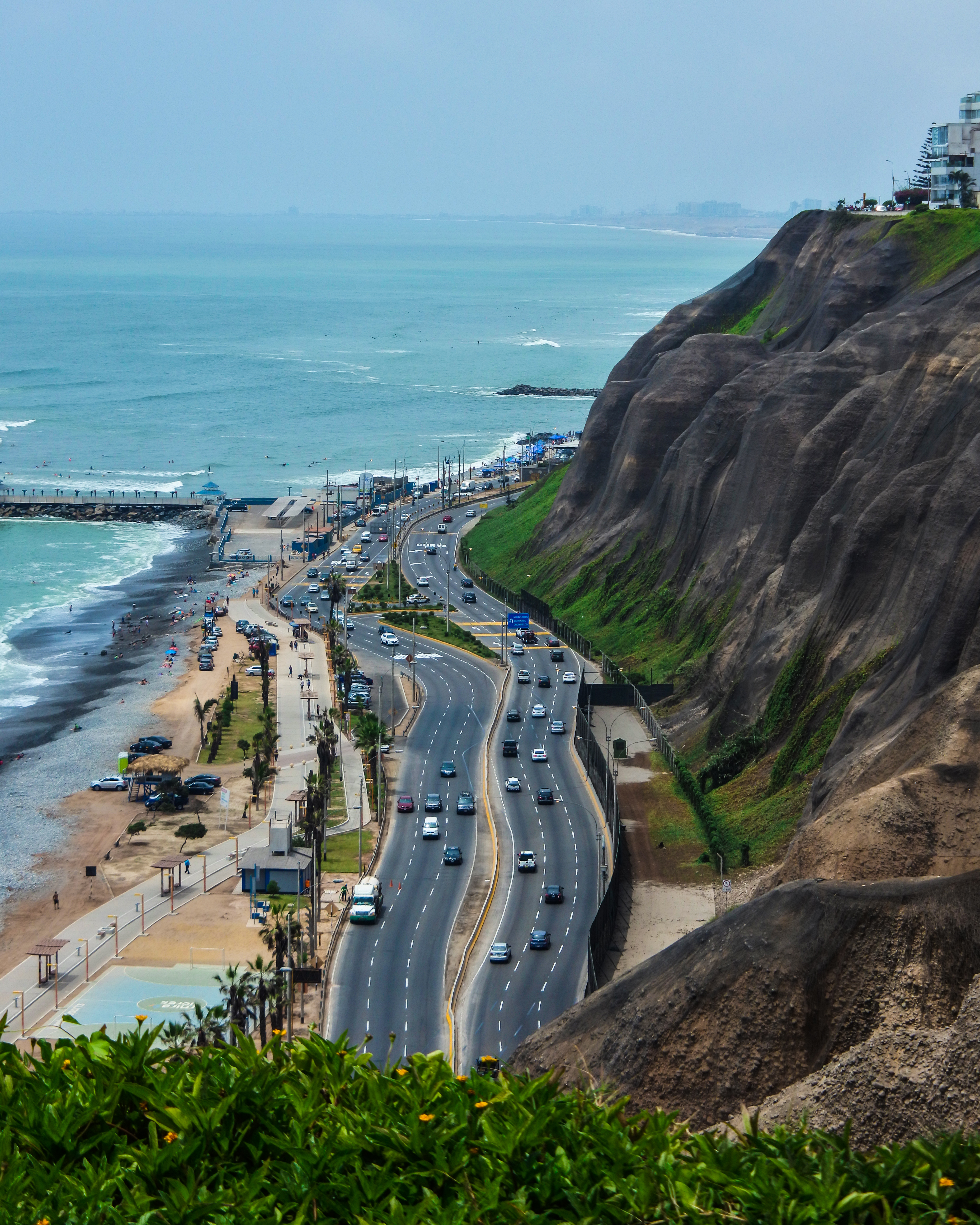 Circuito de Playas adyacente al distrito de Miraflores de Lima con el Océano Pacífico al fondo.